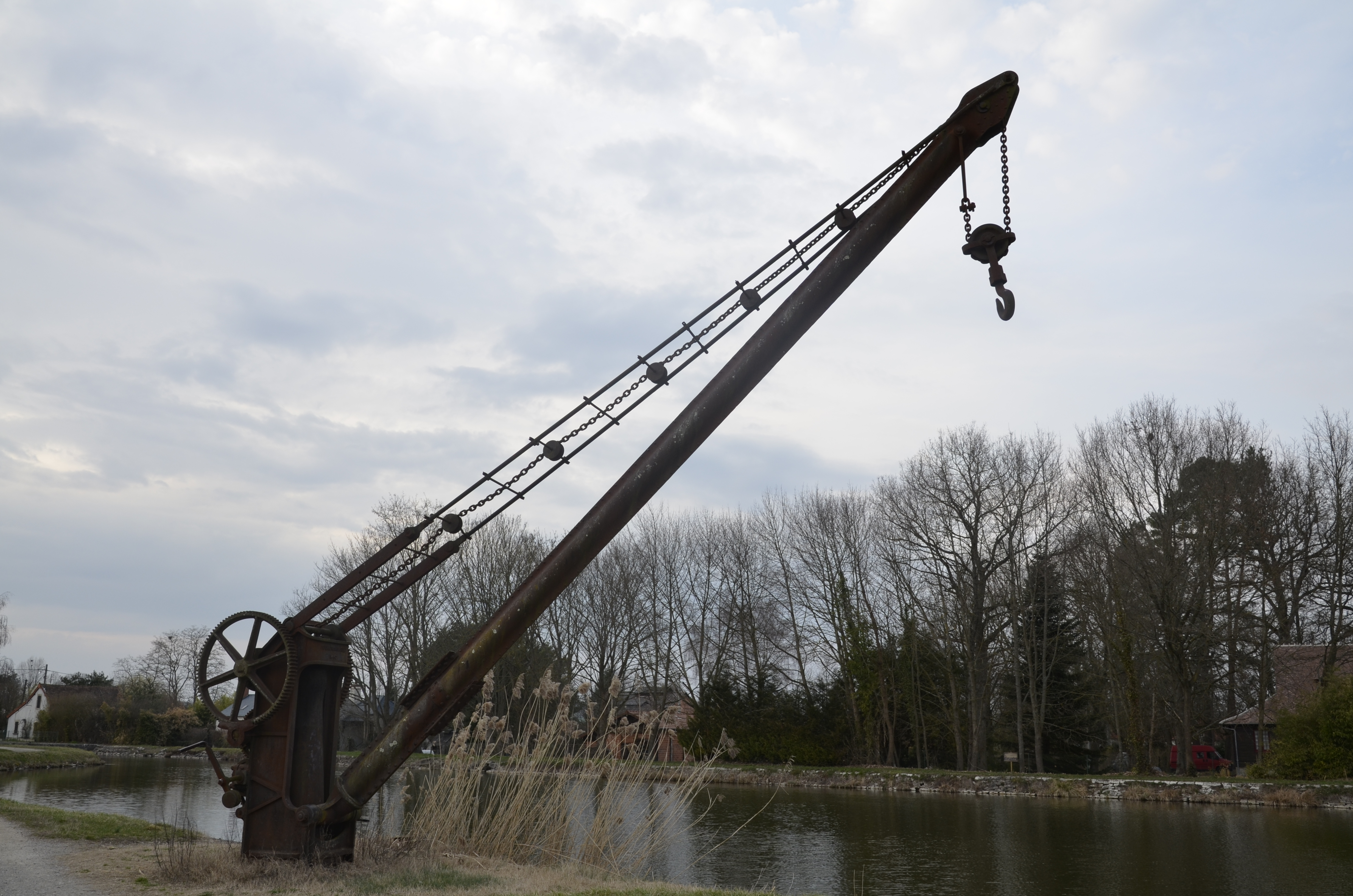 Grue de levage de Laugère, à Charenton du Cher, au bord du Canal de Berry.